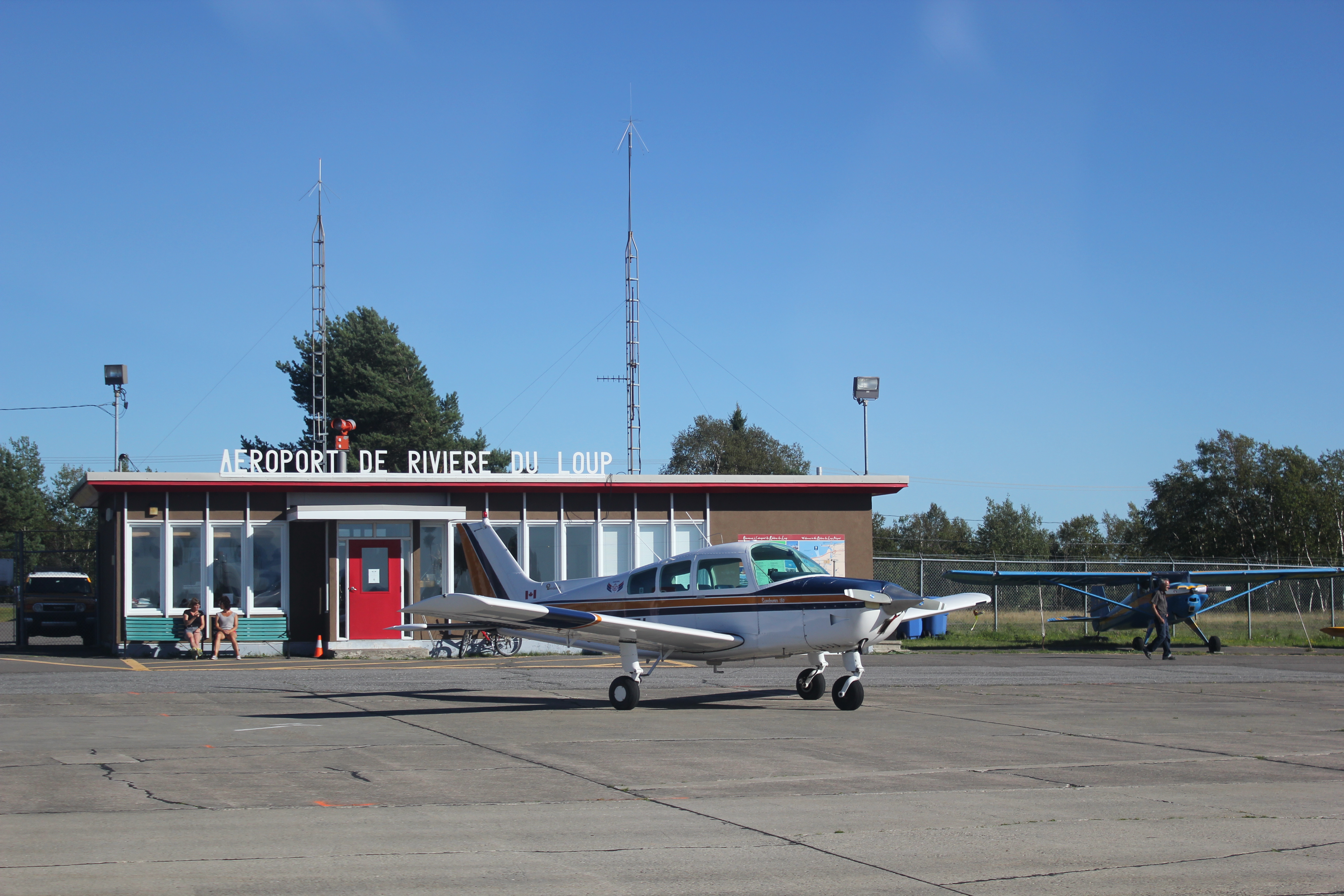 Photo de l'aéroport de Rivière-du-Loup